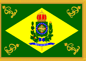 Imperial Standard for Cavalry of the Imperial Brazilian Army, 1850.